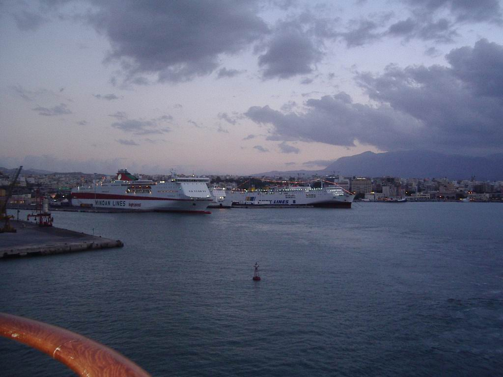 Port d'Heràkleion, foto feta per J. Ollé l'agost del 2005